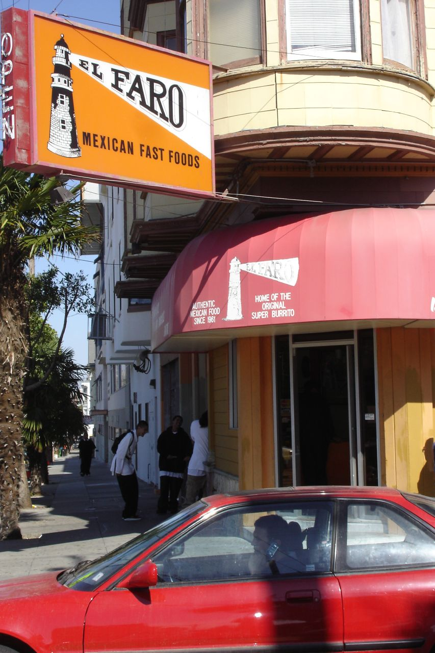 El Faro Mexican restaurant, San Francisco, California